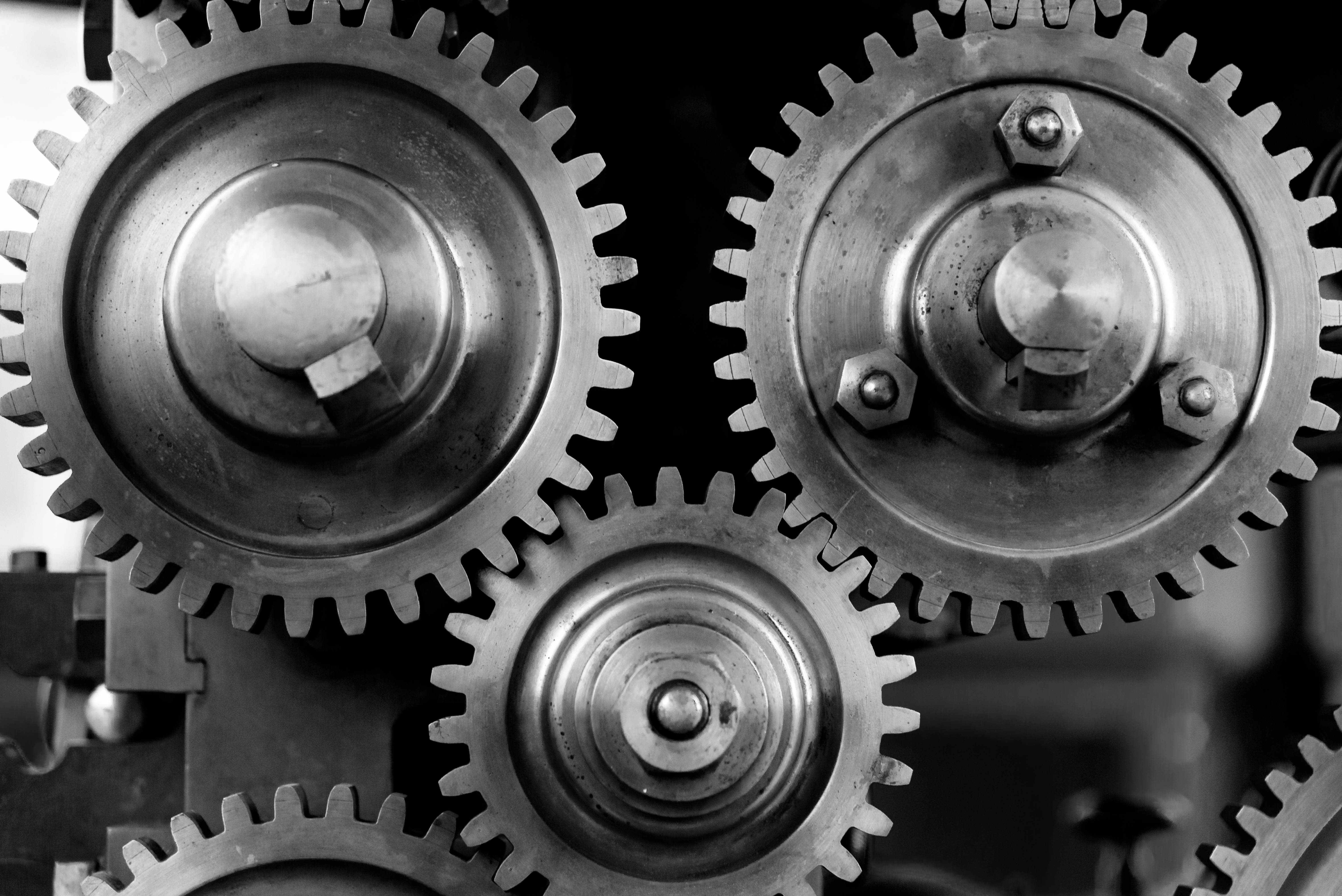 Part of a printing press in the Musée des arts et métiers in Paris